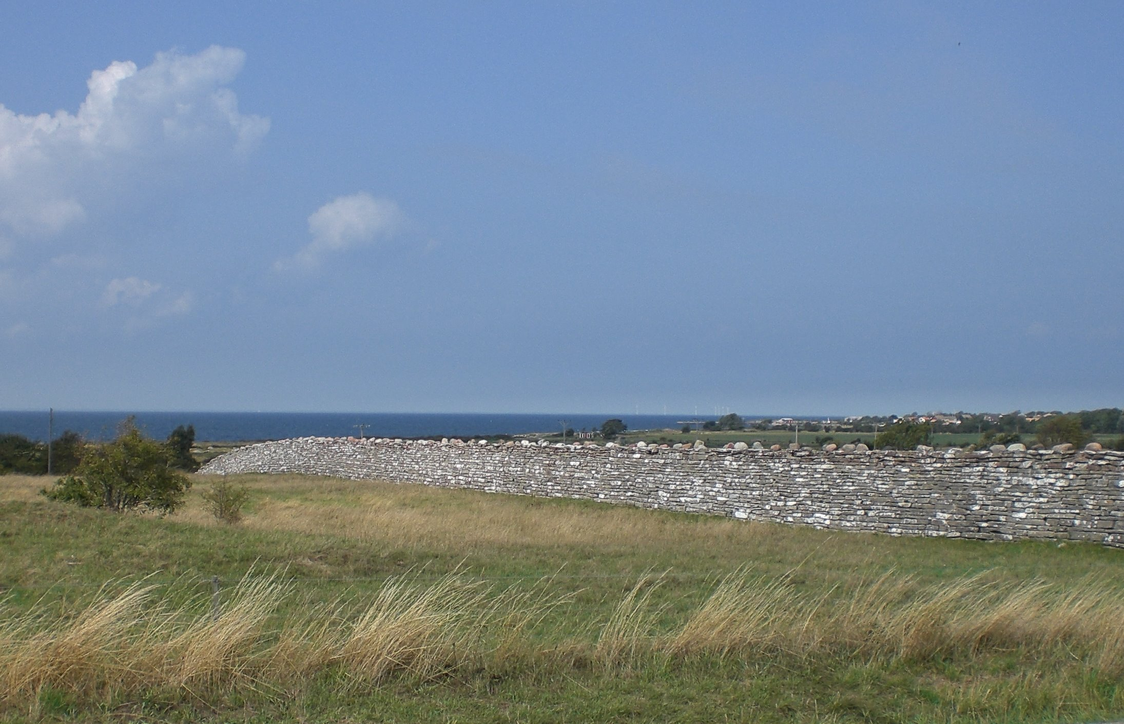 Mauer Karls X. Gustav im Süden Ölands, im Hintergrund der Kalmarsund